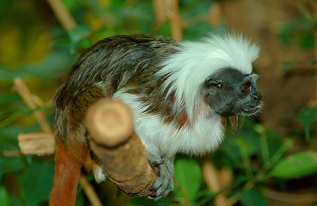 Lisztäffchen (Saguinus oedipus)